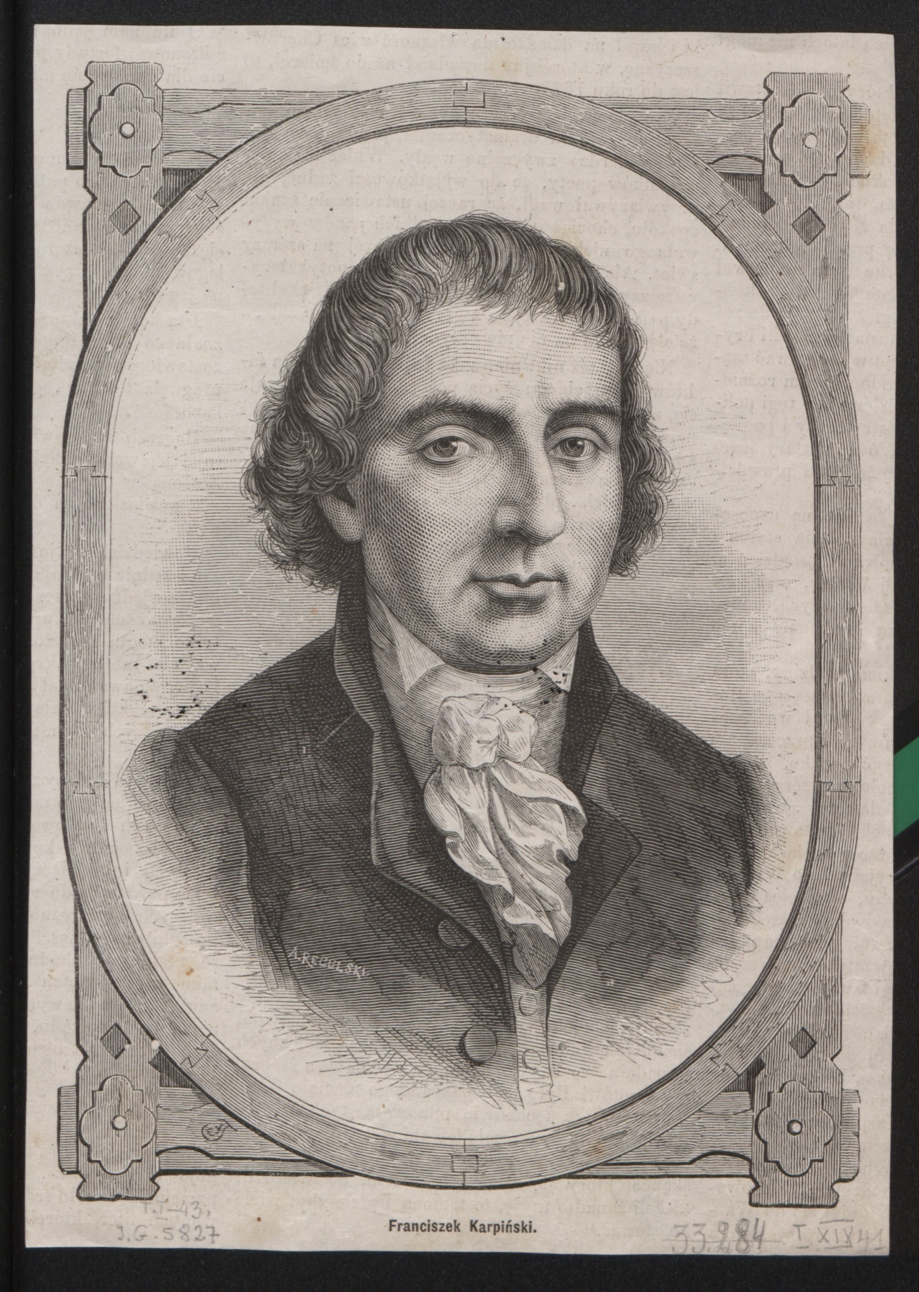 Franciszek Karpiński